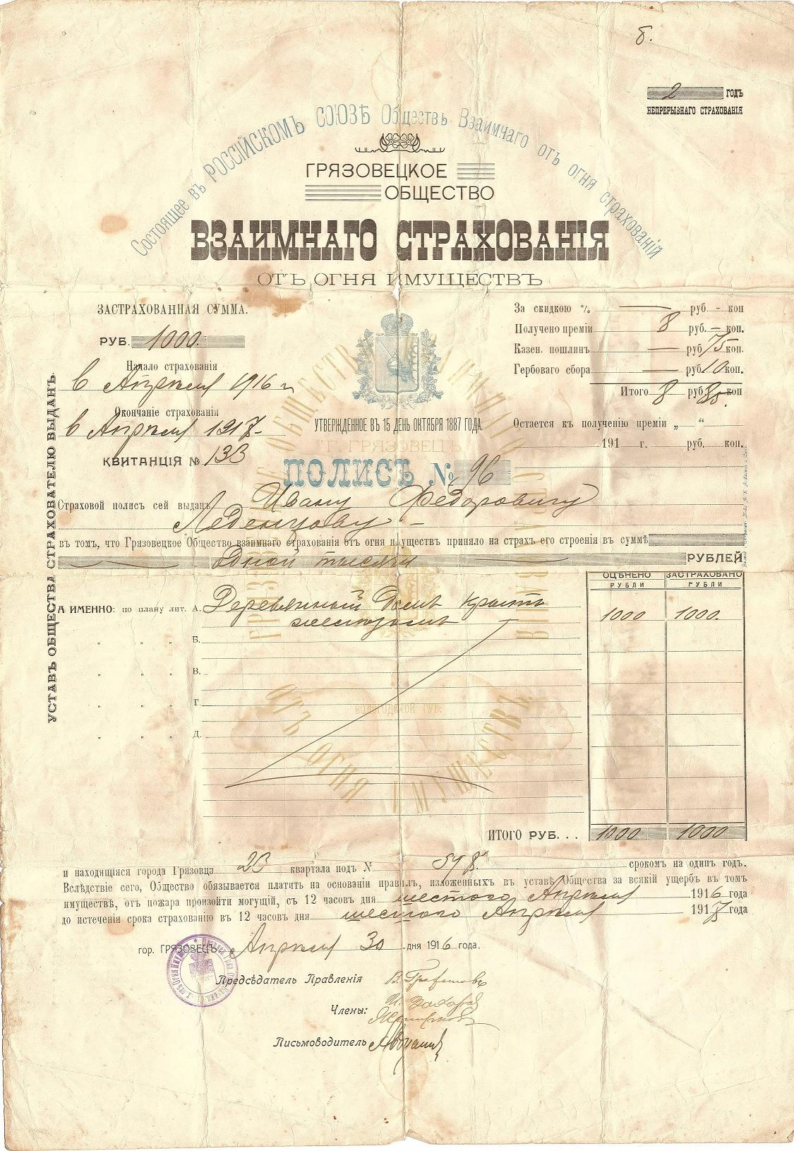 Полис страхования дома от пожара на имя Леденцова Ивана Федоровича.